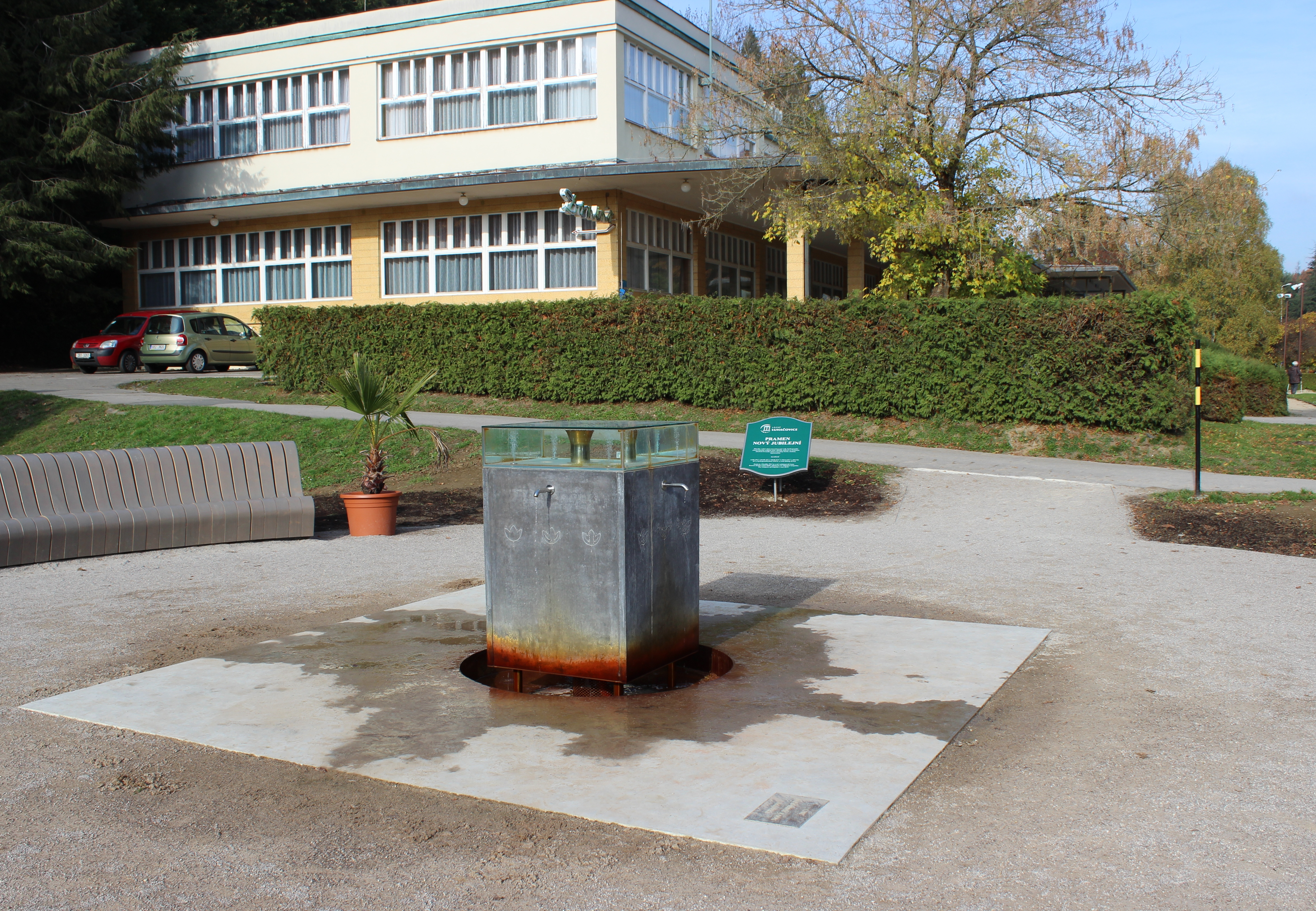 Pramen Nový Jubilejní poblíž kolonády v Luhačovicích (v pozadí místní Společenský dům).